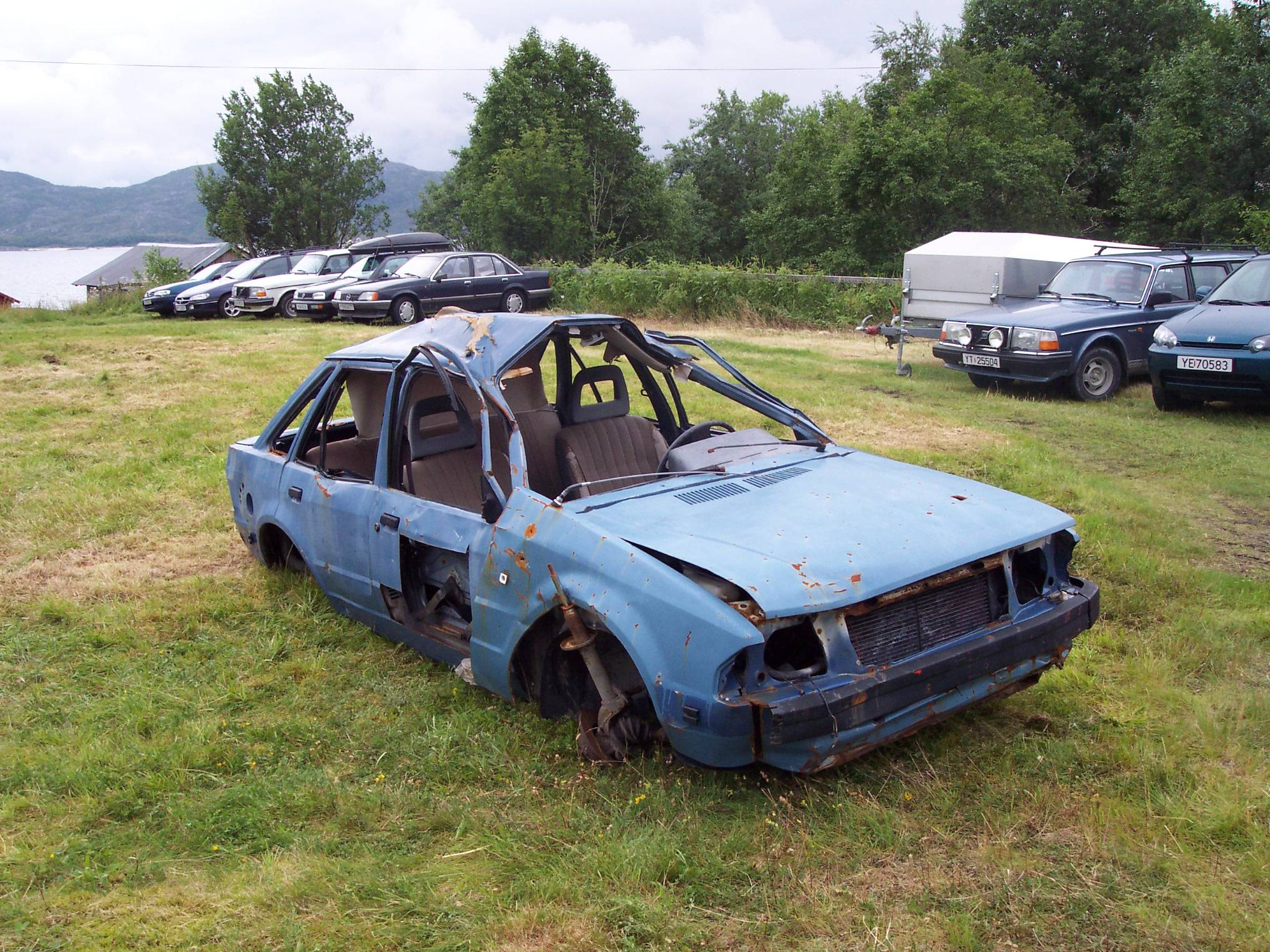 Et bilvrak